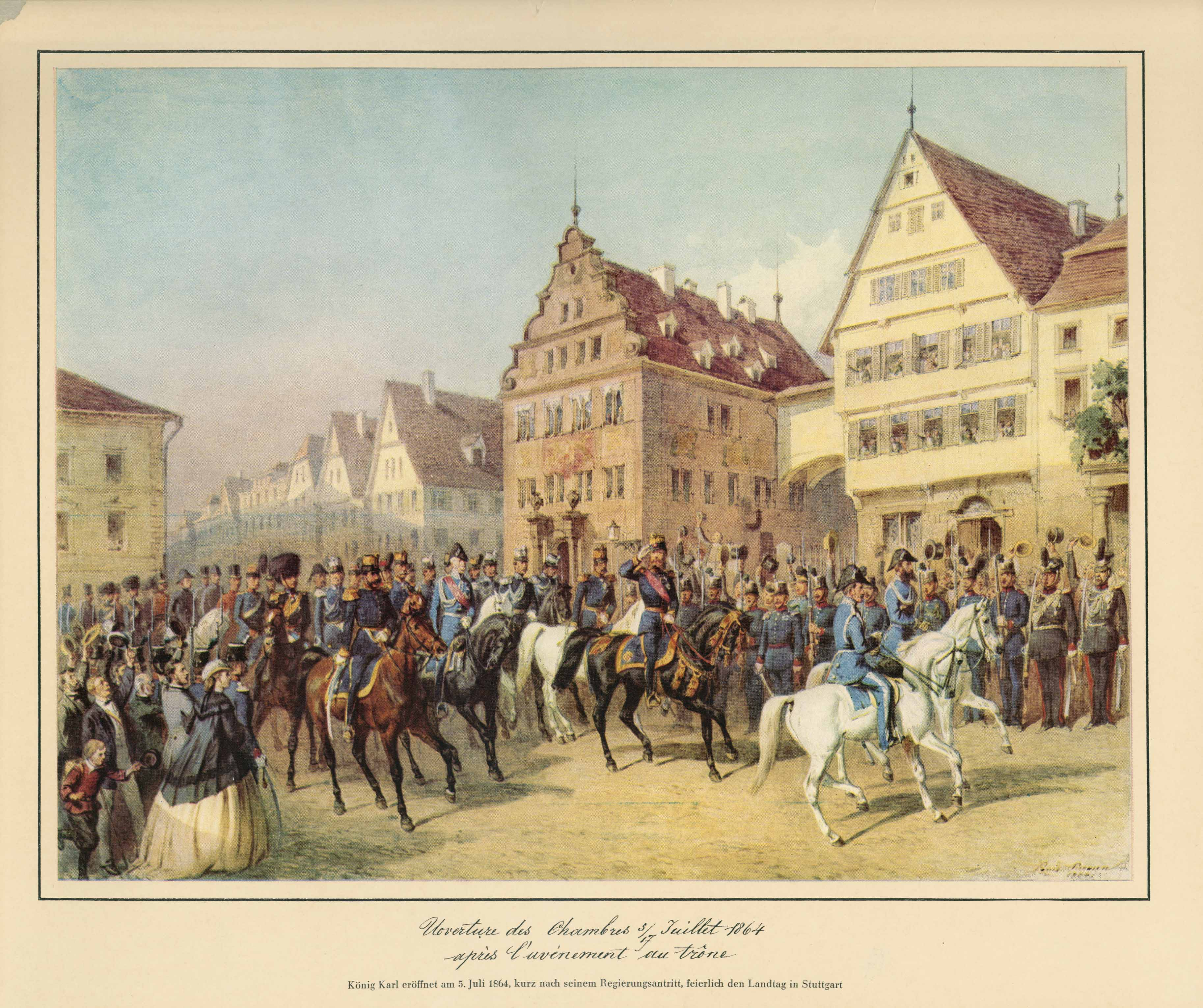 Feierliche Eröffnung des Landtags durch König Karl von Württemberg - kurz nach seinem Amtsantritt - am 5. Juli 1864 (HStAS J 302 Nr. 21)